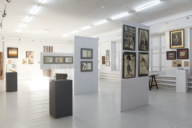 Приручая Пустоту. 50 лет современного искусства Урала